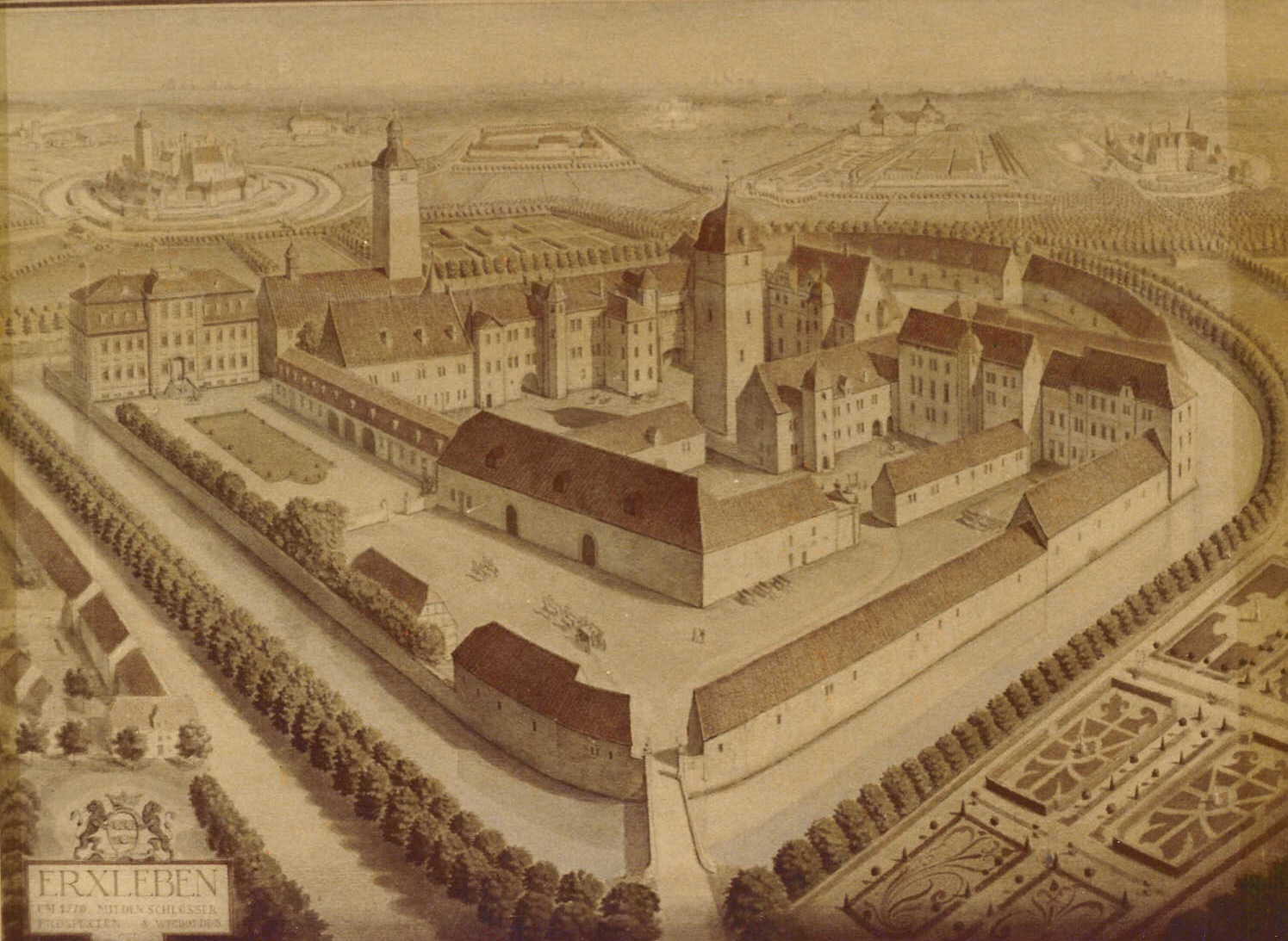 Burg Erxleben um 1735